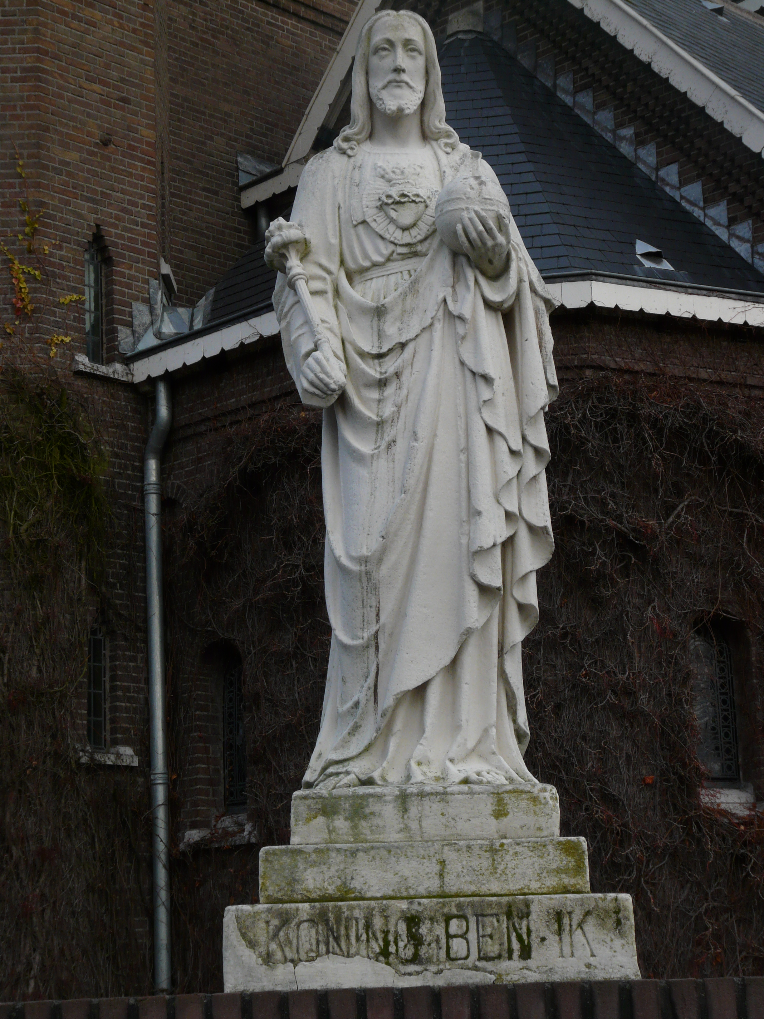 Standbeeld voor de kerk in Teteringen